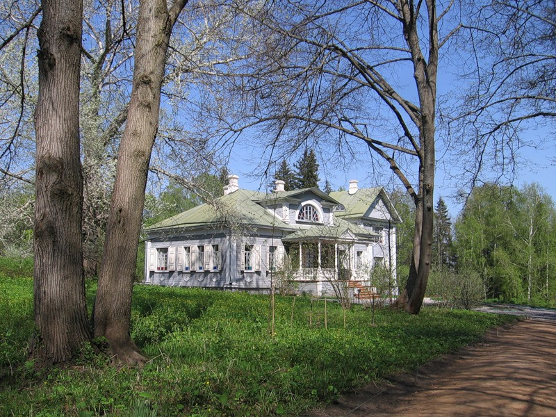 Усадьба Блока А. А. «Шахматово» (Москва и Московская область, Солнечногорск, село Шахматово)